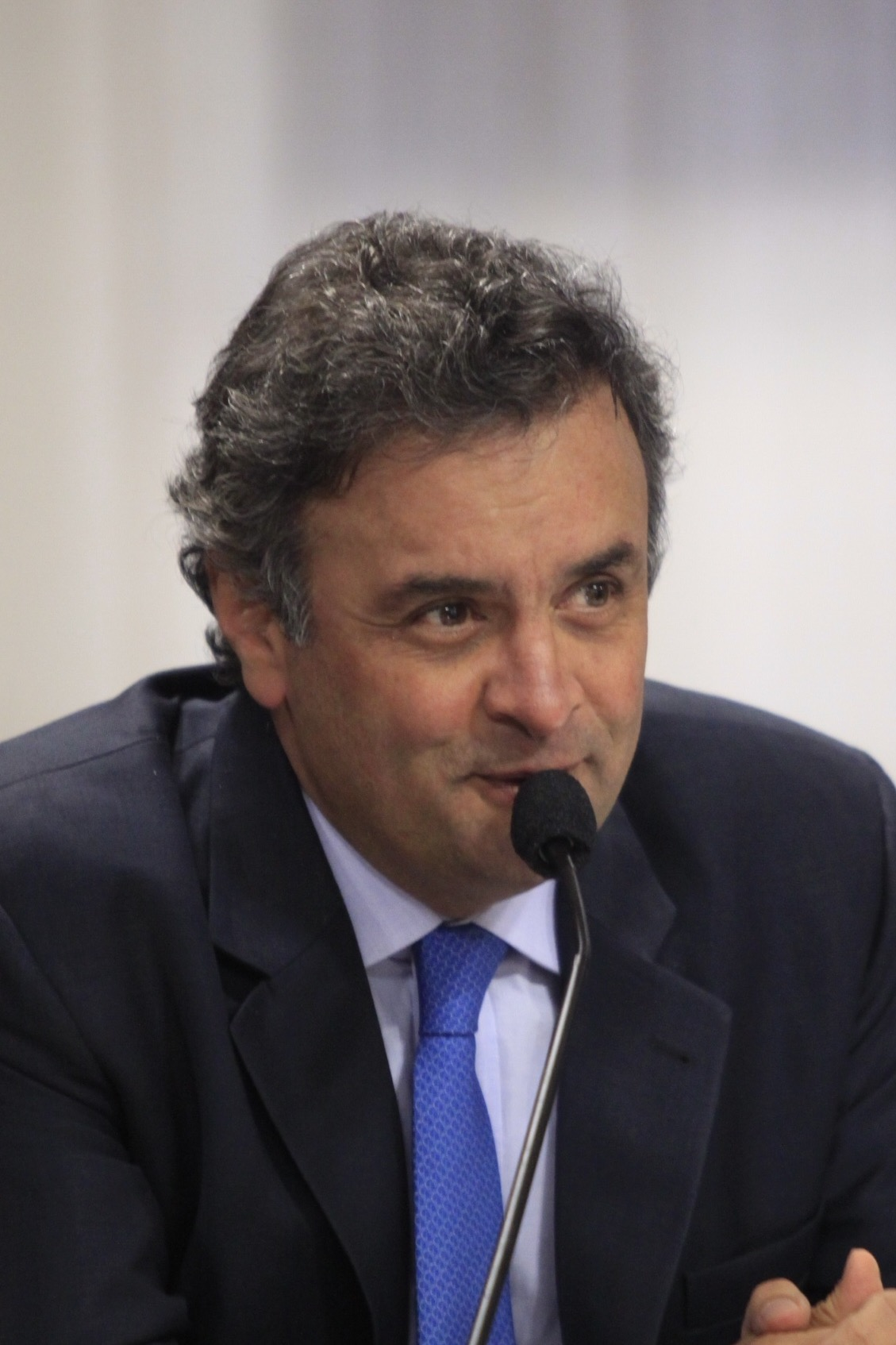 O senador Aécio Neves (PSDB-MG) participou, nesta quarta-feira (05/06), de reunião da Comissão de Constituição e Justiça (CCJ) em que foi realizada sabatina do novo ministro indicado à vaga do STF, Luís Roberto Barroso.